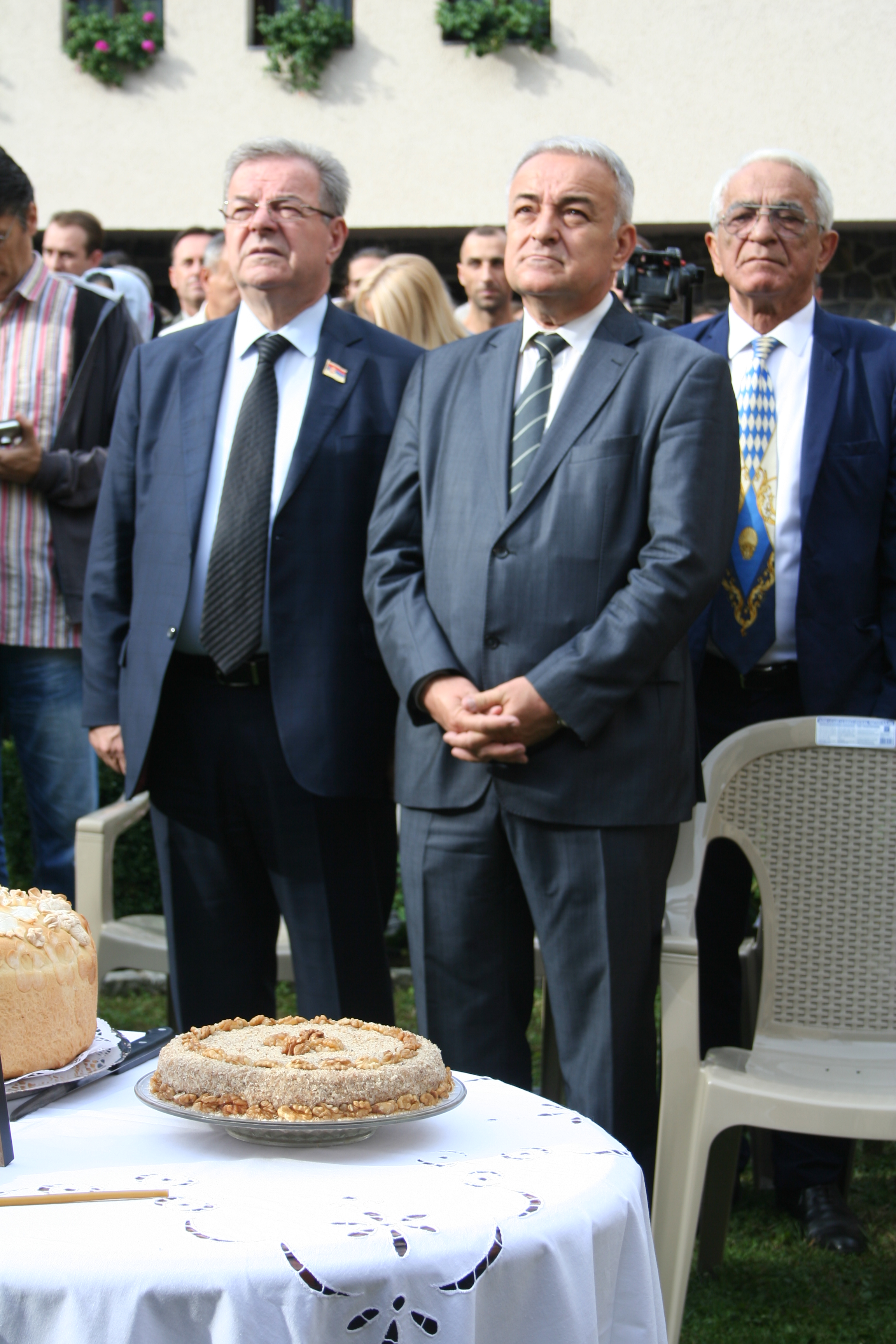 Manastir Tronoša-proslava 700 godina postojanja